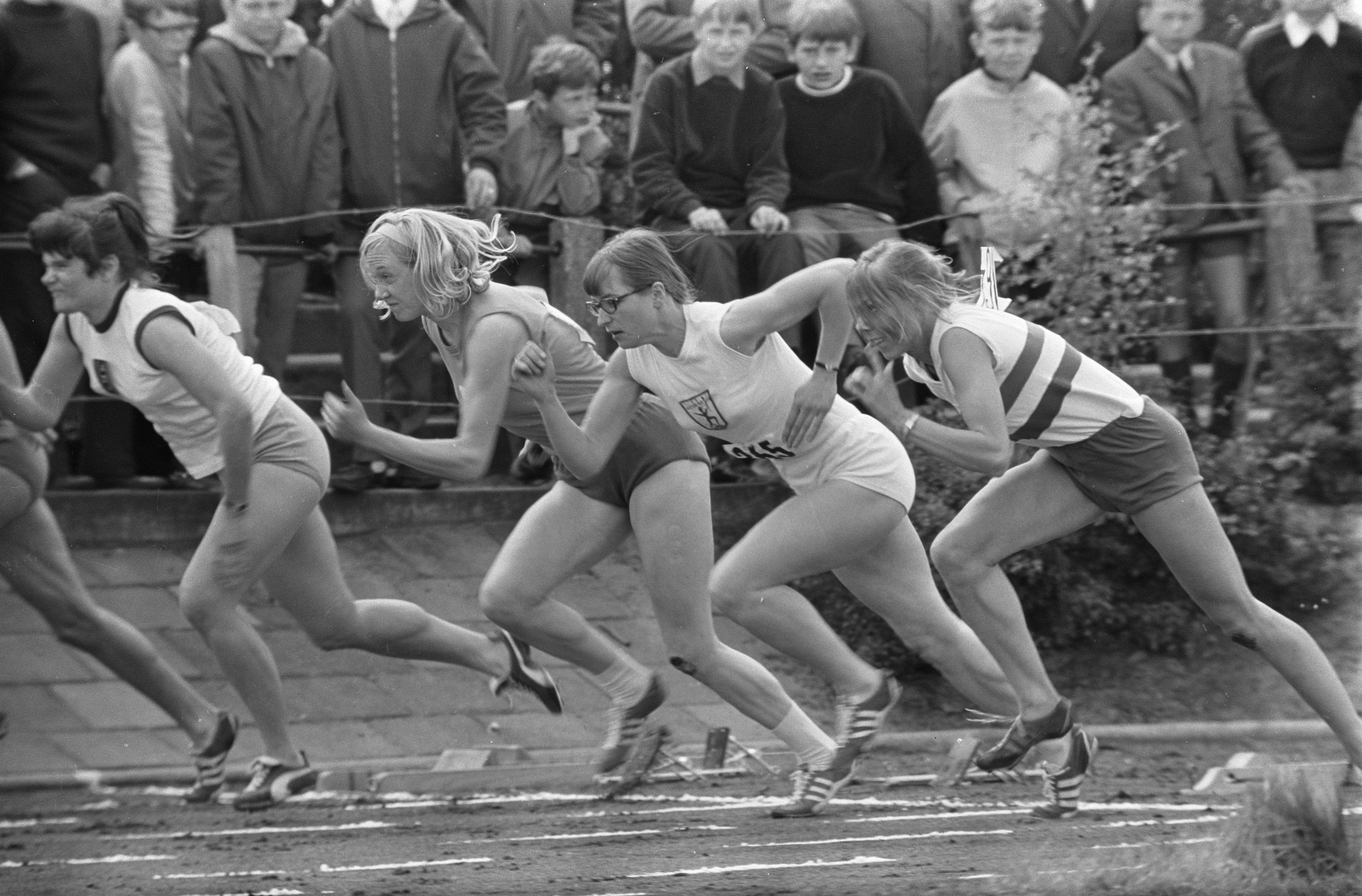 Collectie / Archief : Fotocollectie Anefo Reportage / Serie : Nationale Atletiekwedstrijden te Lisse Beschrijving : Start 100m dames. Lidy Makkinje-Vonk, Corrie Bakker, Wilma van der Berg, C. Cival Datum : 19 mei 1968 Locatie : Lisse, Zuid-Holland Trefwoorden : atletiek, wedstrijden Persoonsnaam : Bakker, Corrie, Berg, Wilma van der, Cival, C., Makkinje-Vonk, Lidy Fotograaf : Fotograaf Onbekend / Anefo Auteursrechthebbende : Nationaal Archief Materiaalsoort : Negatief (zwart/wit) Nummer archiefinventaris : bekijk toegang 2.24.01.05 Bestanddeelnummer : 921-3633